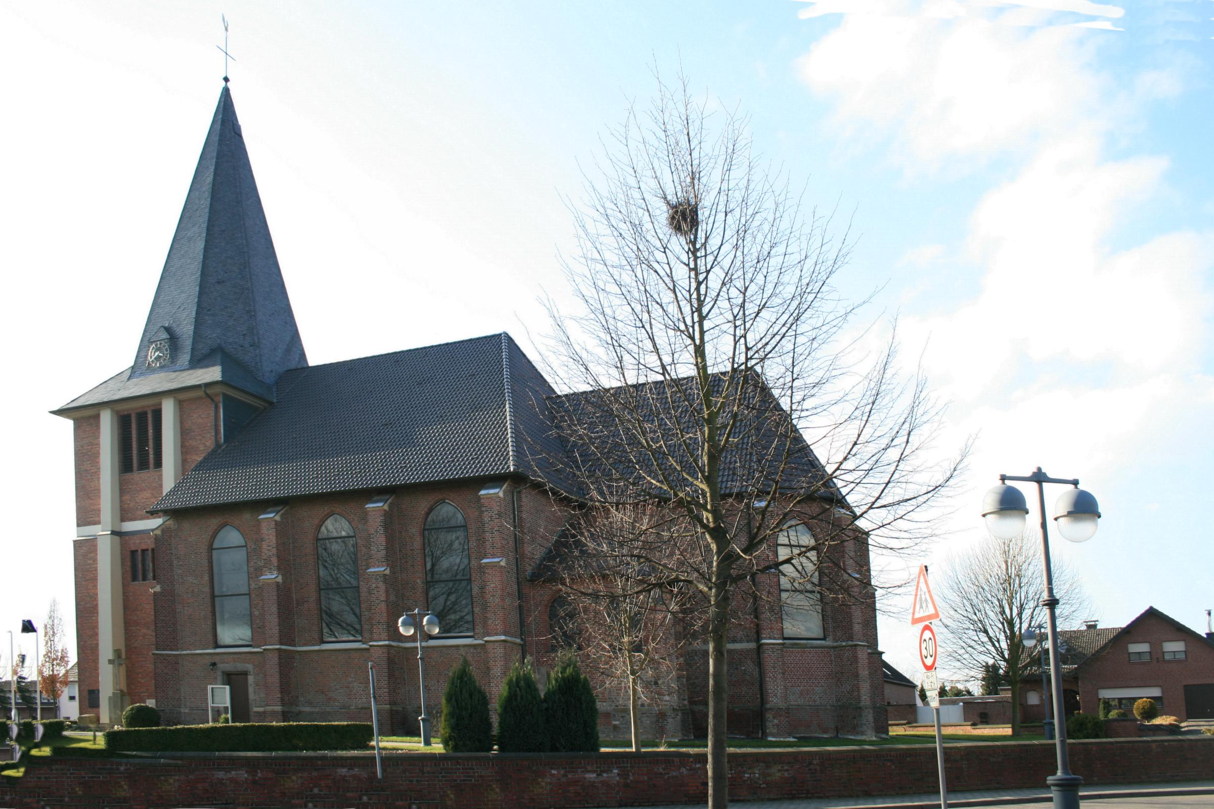 Kath. Kirche St. Gereon in Würm, Denkmal Nr. 48 in Geilenkirchen